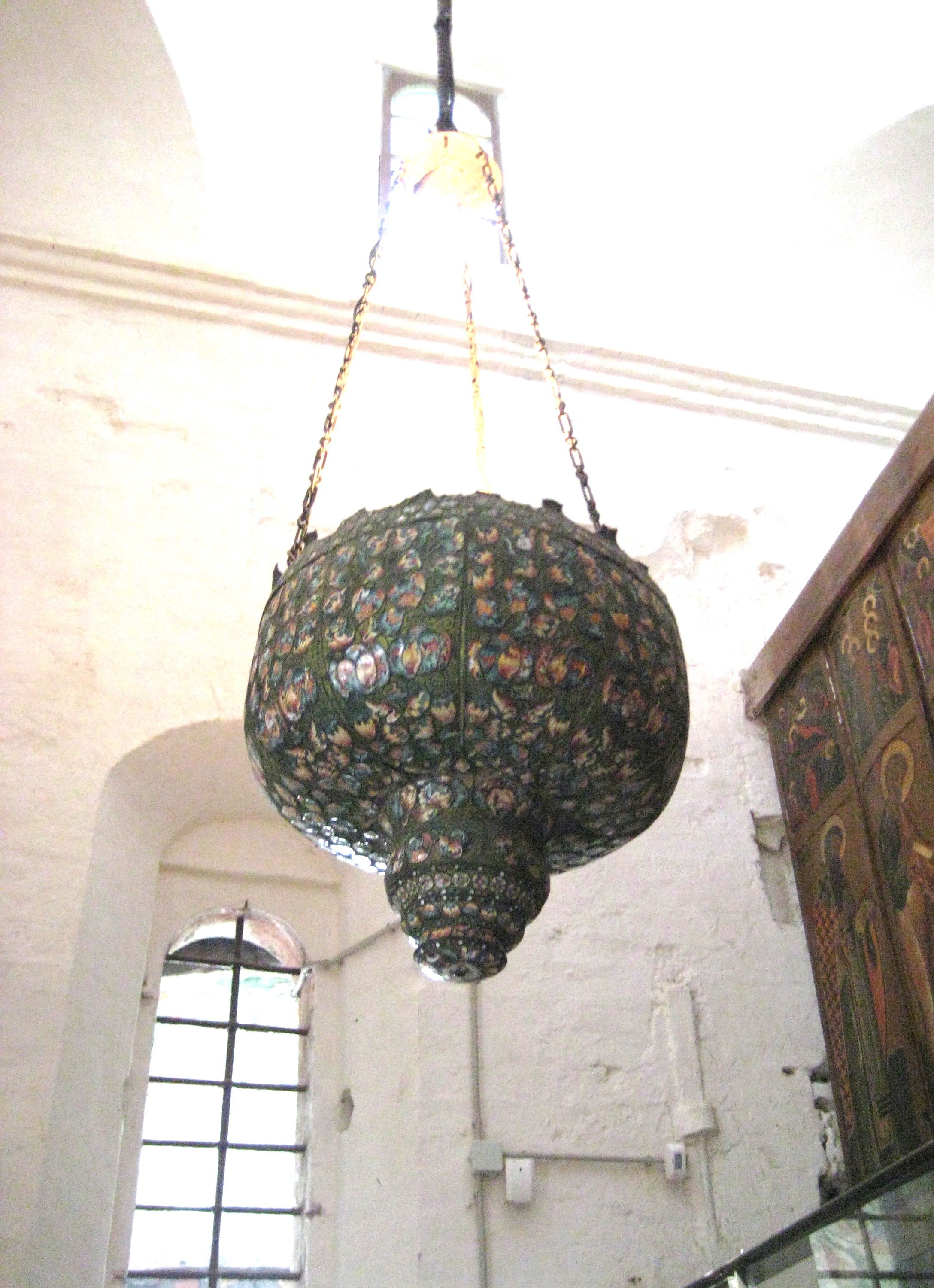 Светильник. Собор Василия Блаженного